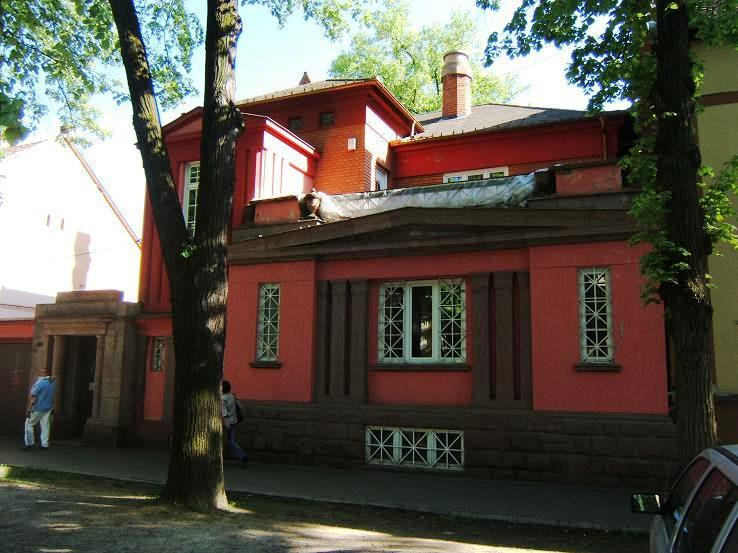 A kaposvári Lamping-villa